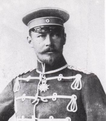 Friedrich Franz III. (Mecklenburg-Schwerin)